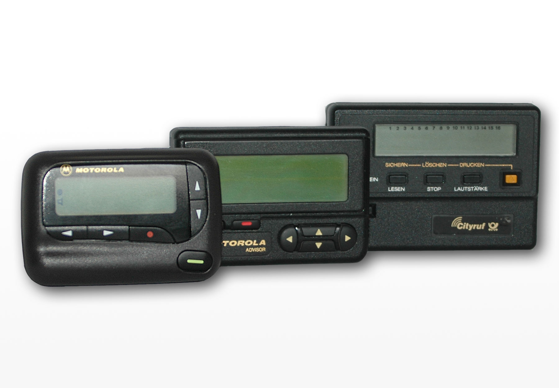 Entwicklung der digitalen Funkmeldeempfänger von Motorola (v.r.n.l.): PMR 2000 (1988), Motorola Advisor (1991) und Motorola Scriptor LX4 (1996)